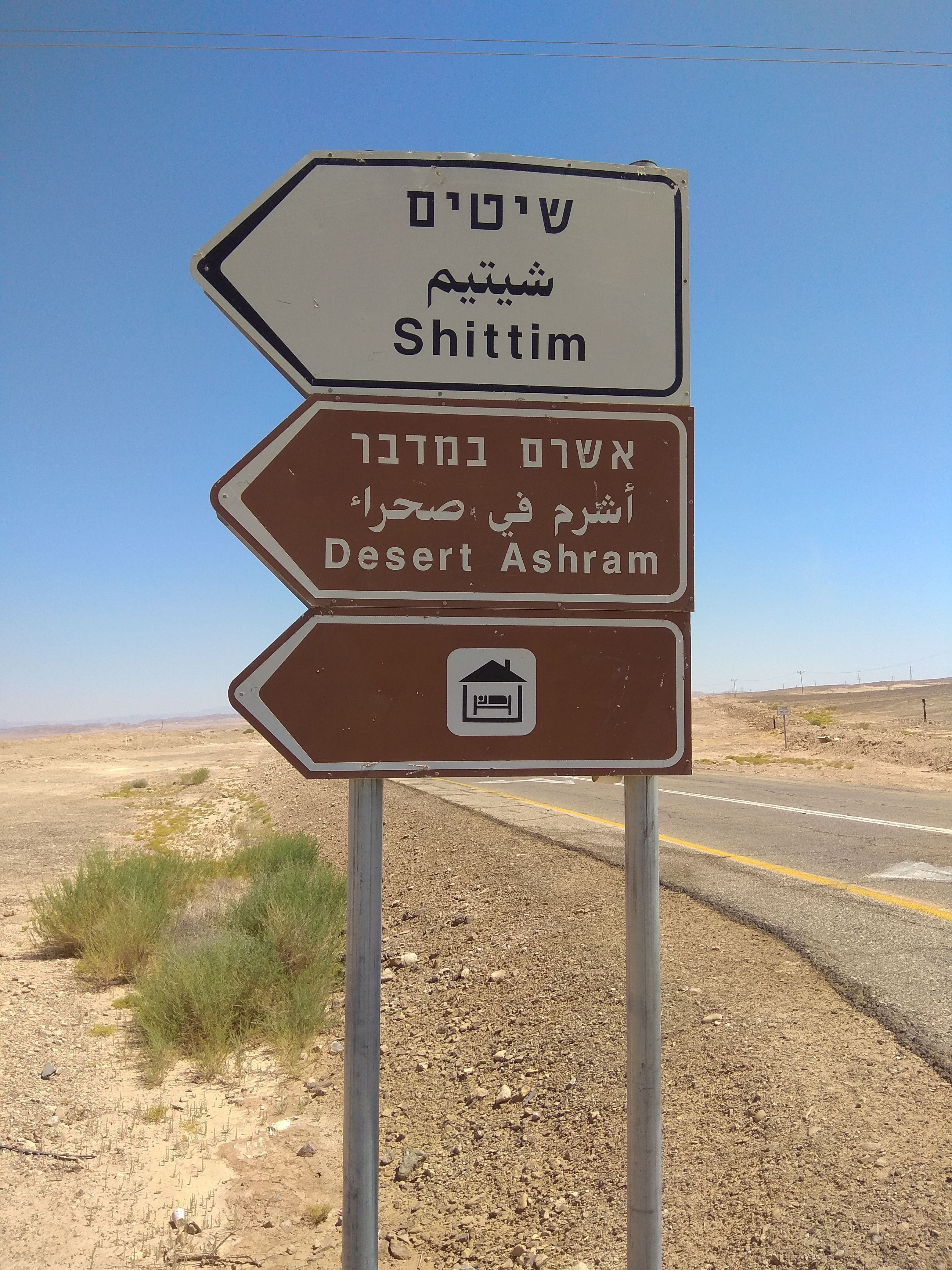 שלט המוביל לשיטים